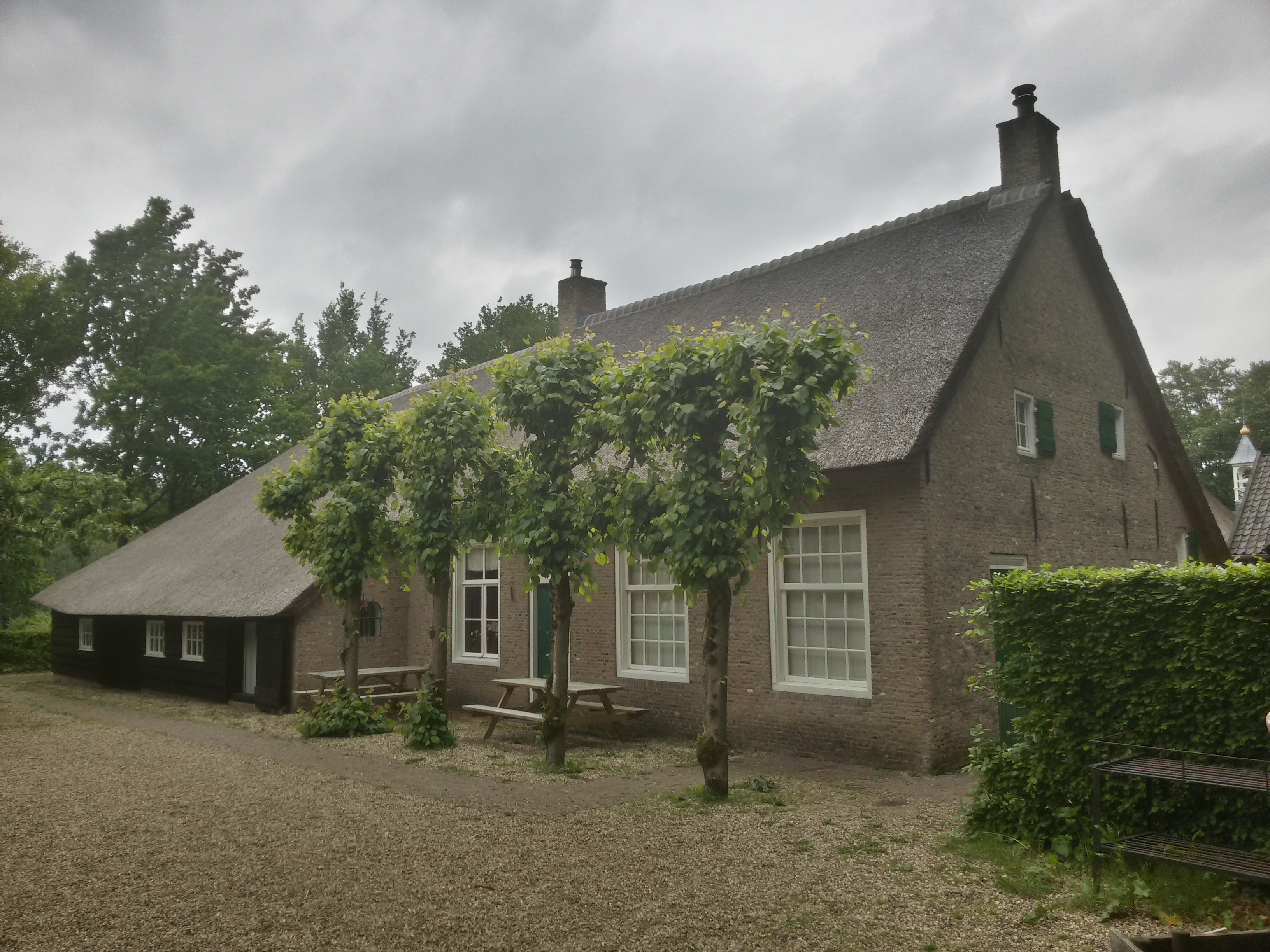 Openluchtmuseum Arnhem, Boerderij Etten-Leur